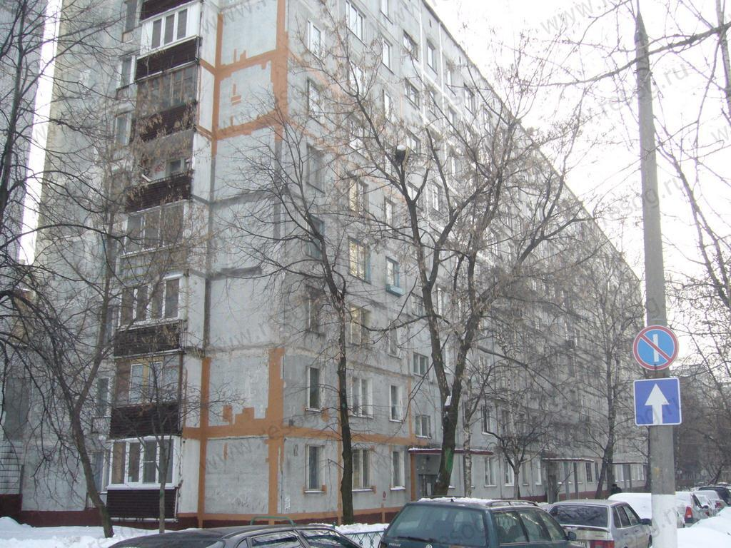 Фасад здания серии II-49